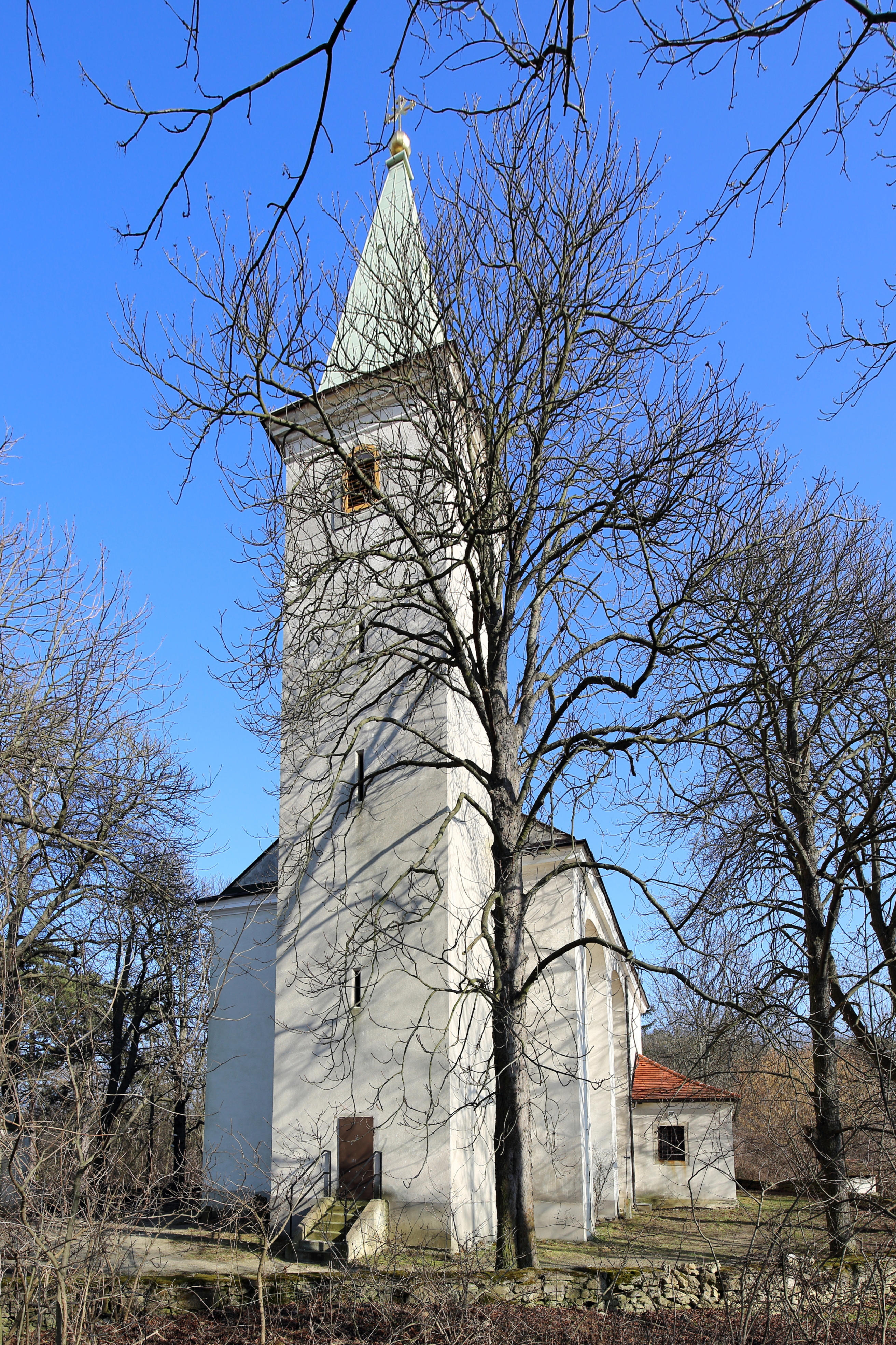 Westansicht der katholischen Wallfahrtskirche hl. Lambert am Heiligenberg in Hautzendorf, ein Ortsteil der niederösterreichischen Gemeinde Kreuttal.